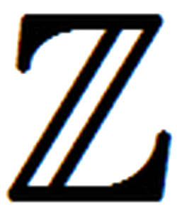 Ամբողջ թվերի բազմության նշանը